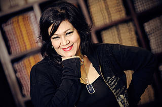 maridalia hernandez